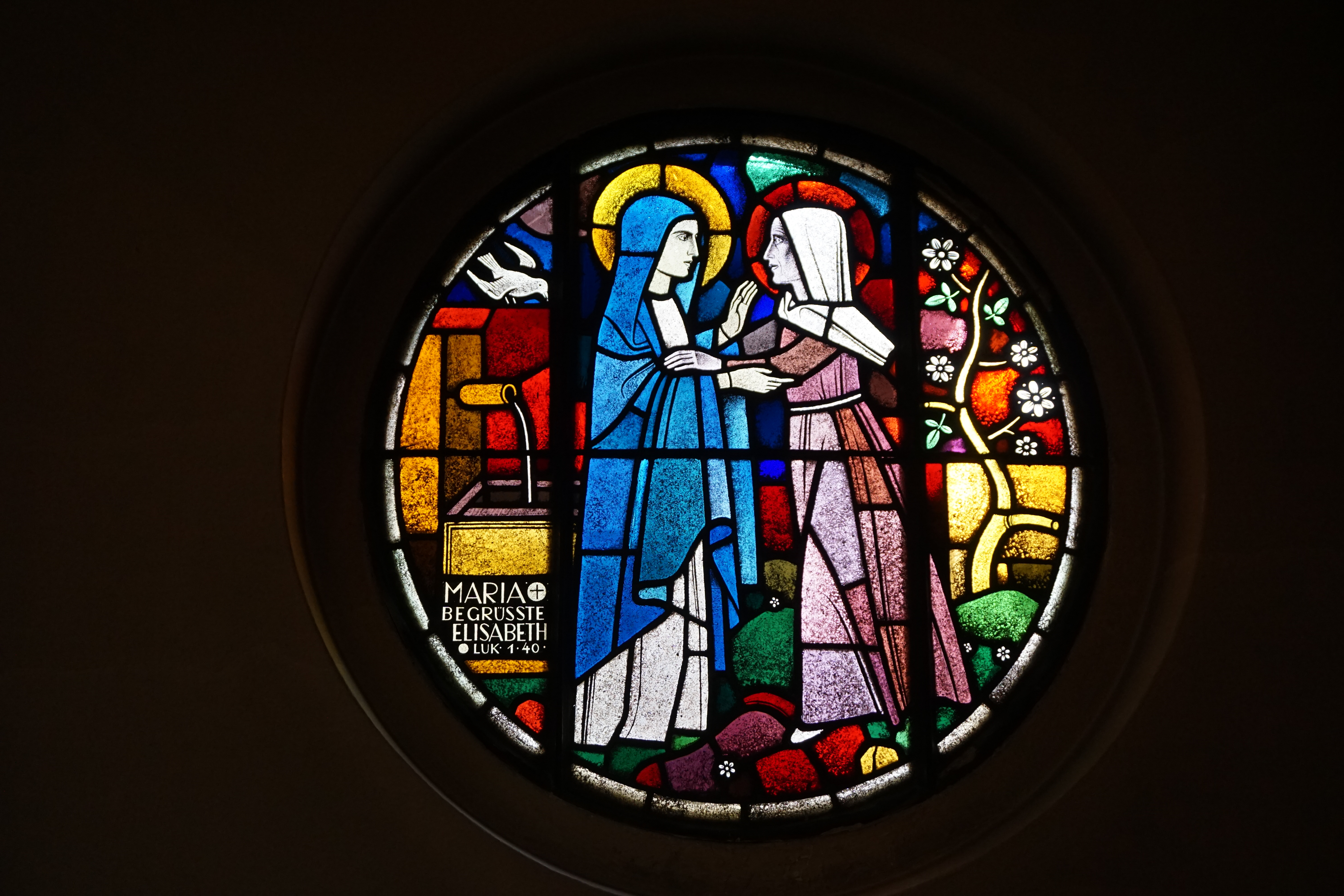 Glasmalerei Maria begrüsste Elisabeth in Seitenkapelle "Sieben Freuden Mariens" von Albin Schweri